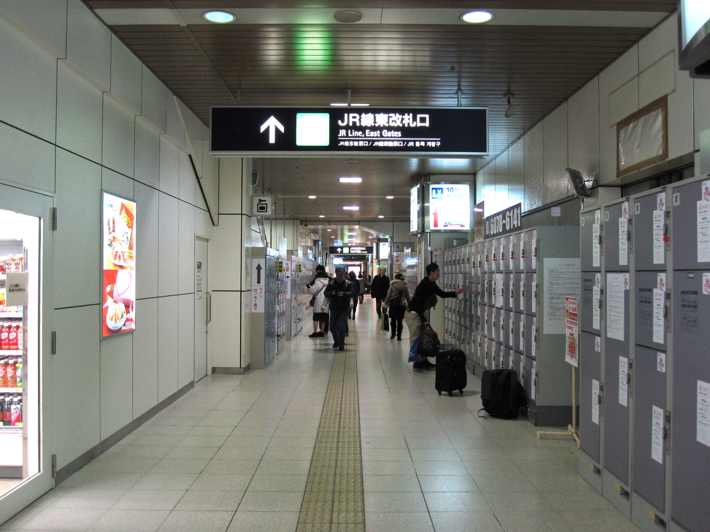 札幌駅東西コンコース南連絡通路（JR北海道函館本線）